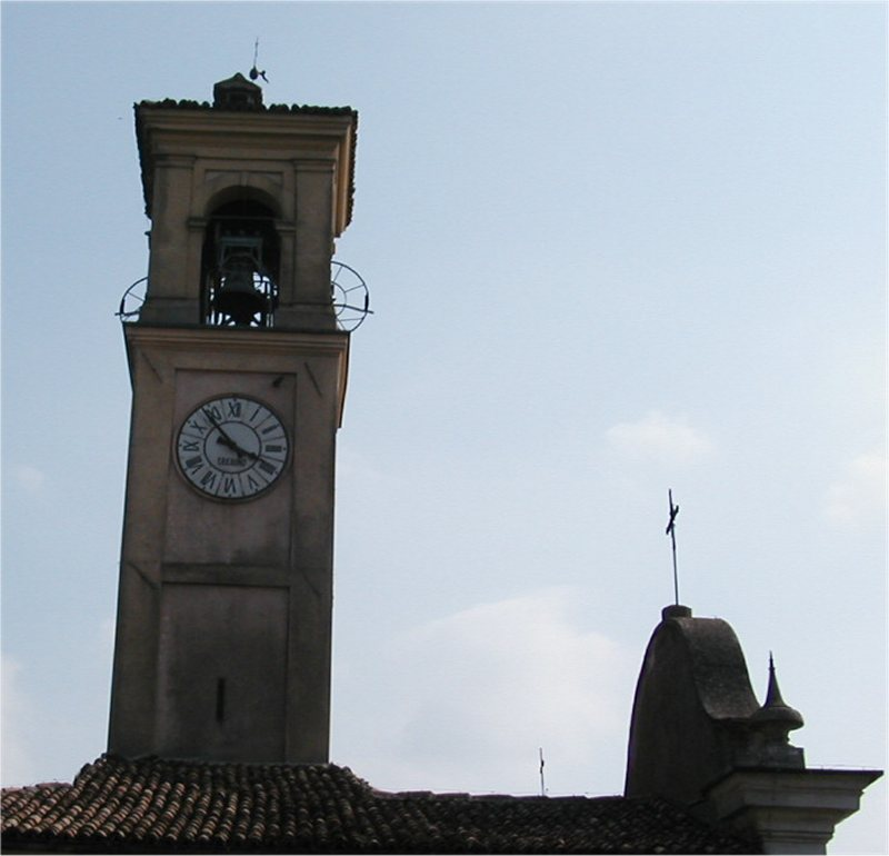 Montù Beccaria: il campanile (Foto di Luigino C.)